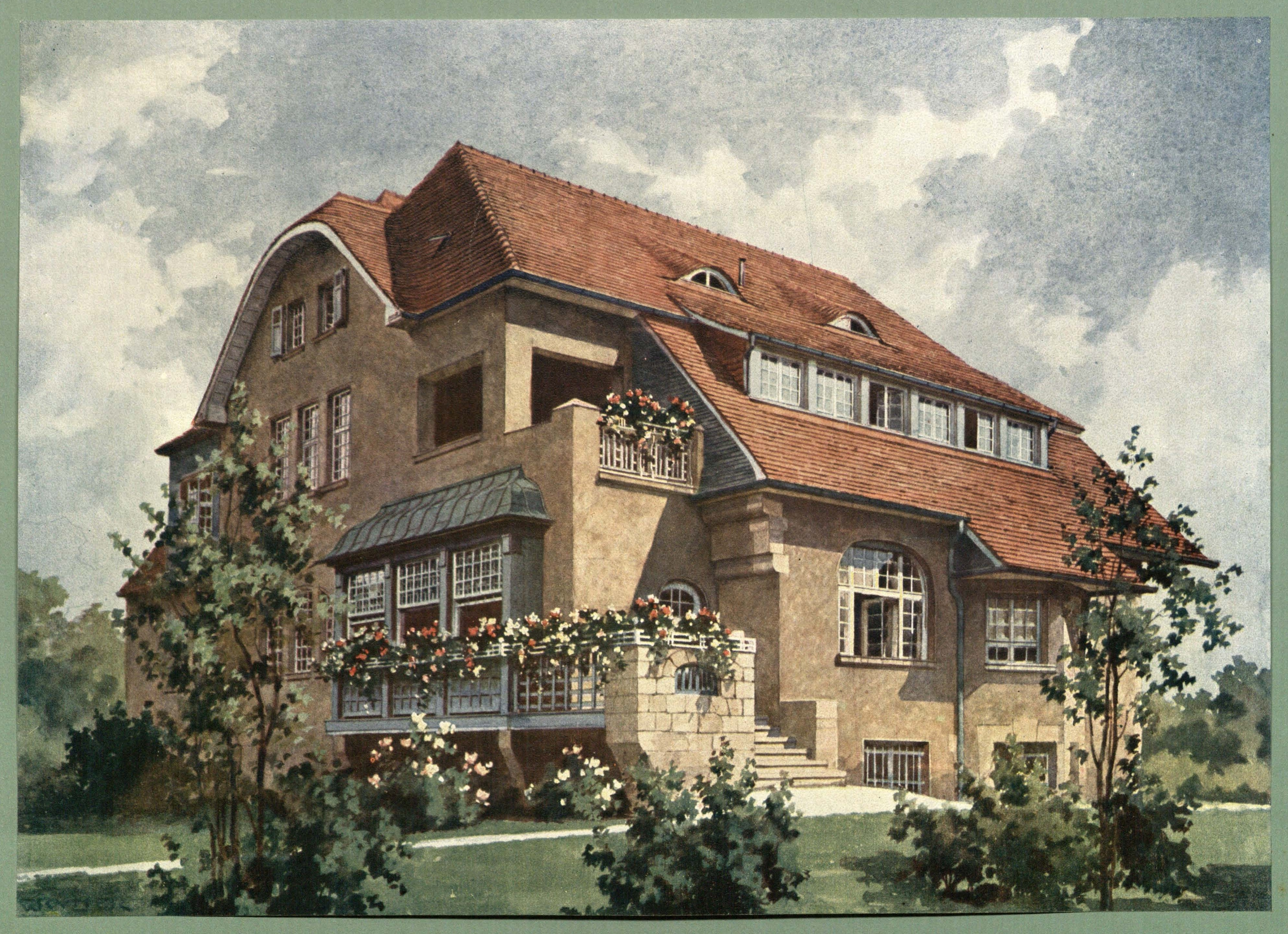 Villa Stubenrauchstraße 9 in Berlin-Zehlendorf, Architekt: Fritz Crzellitzer. Tafel 54 aus Oscar Grüner: Moderne Villen in Meisteraquarellen. Serie II. 64 Tafeln. Verlag Friedrich Wolfrum & Co. Wien und Leipzig ca. 1905.